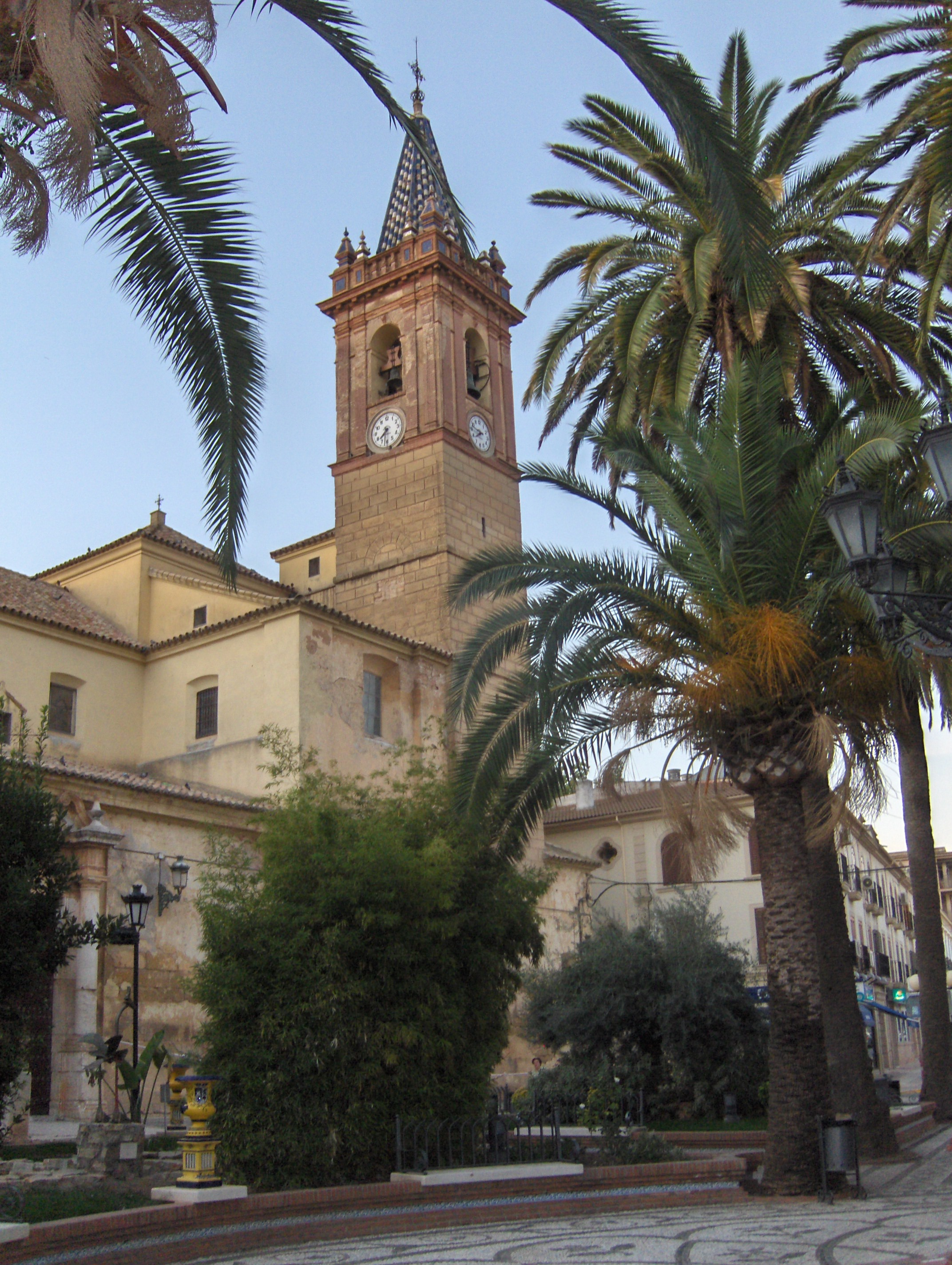 Iglesia del Reposo en Campillos, Málaga, España